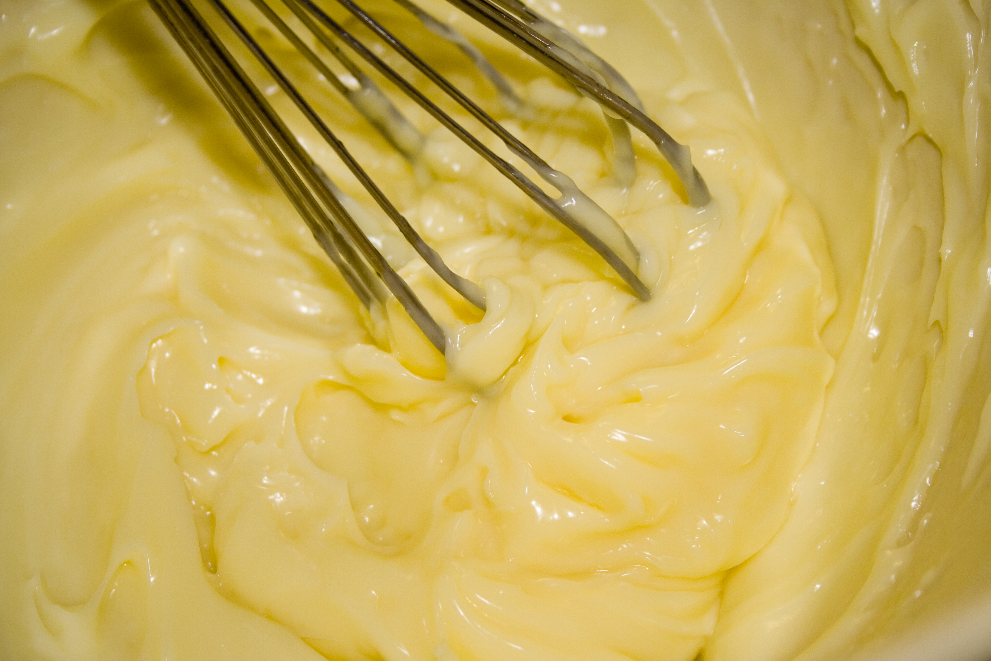 Homemade mayonnaise